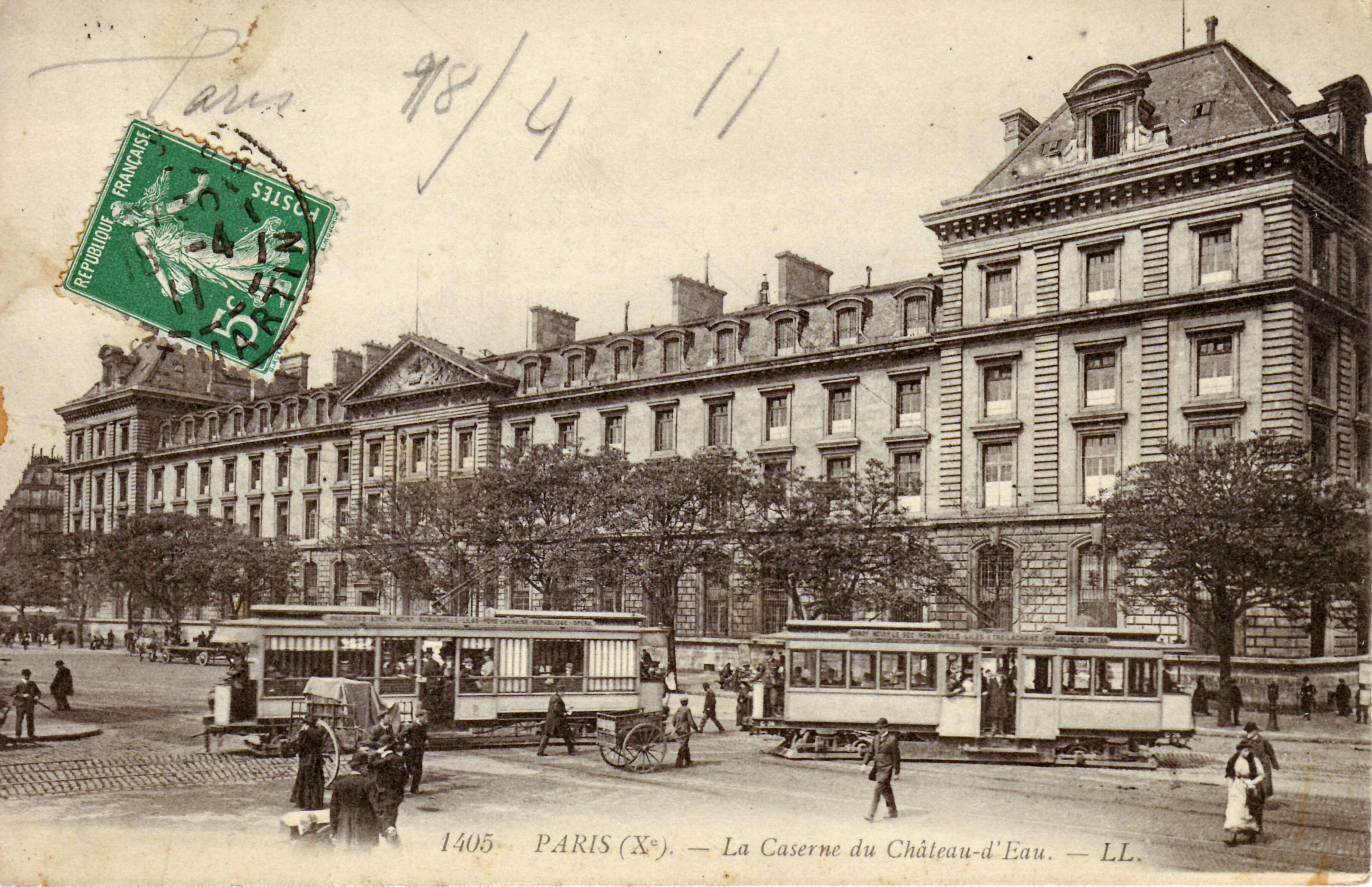 Carte postale ancienne éditée par LL, n° 1405 Paris : La Caserne du Château d'Eau Place de la République : Caserne de la Garde républicaine (Caserne Vérines) et tramways de la compagnie des tramways Est-Parisiens : le premier ligne Pavillons-sous-Bois - Bondy - Romainville - Les Lilas - Père Lachaise - République - Opéra (motrice dype "été") le second Bondy - Noisy-le-Sec - Romainville - Les Lilas - République - Opéra, motrice type "C"